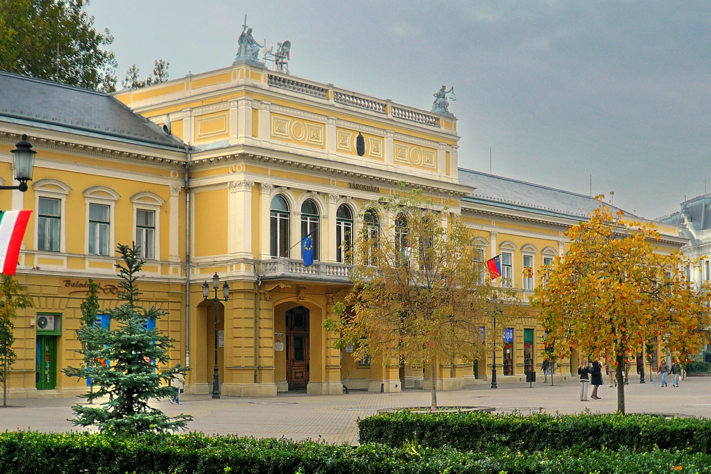 Városháza